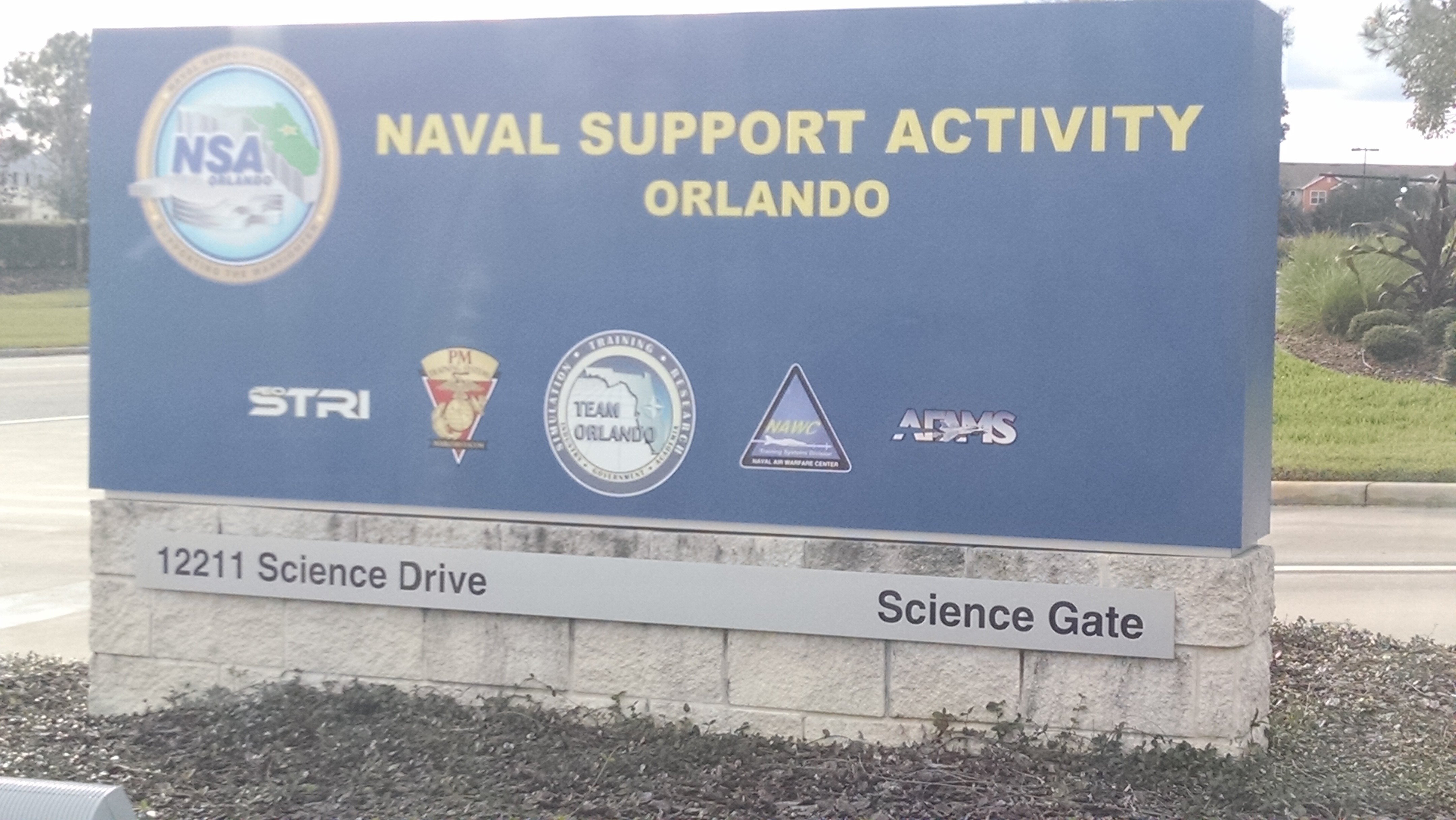 IMG_20160121_152753321